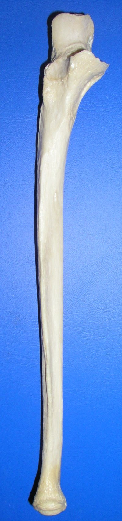 Ulna anterior aspect